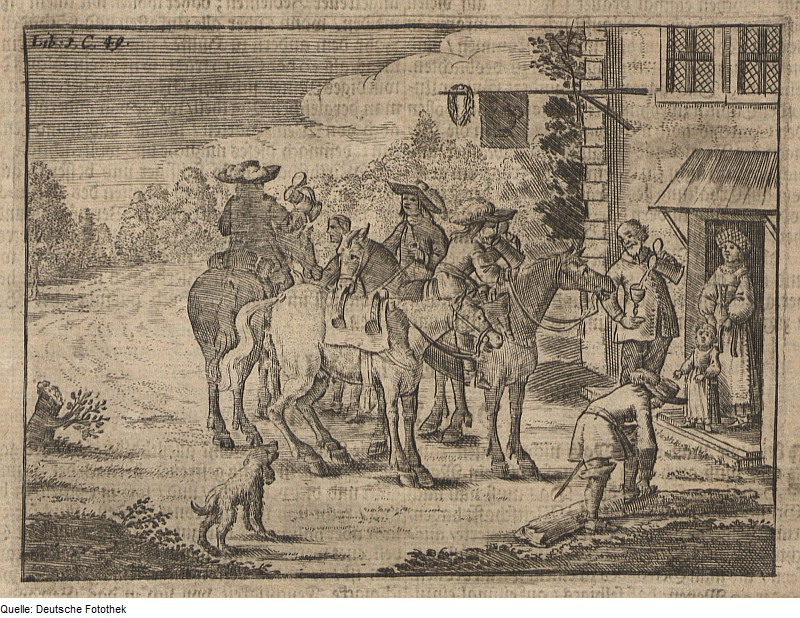 Original image description from the Deutsche Fotothek Gastronomie & Wirtshaus